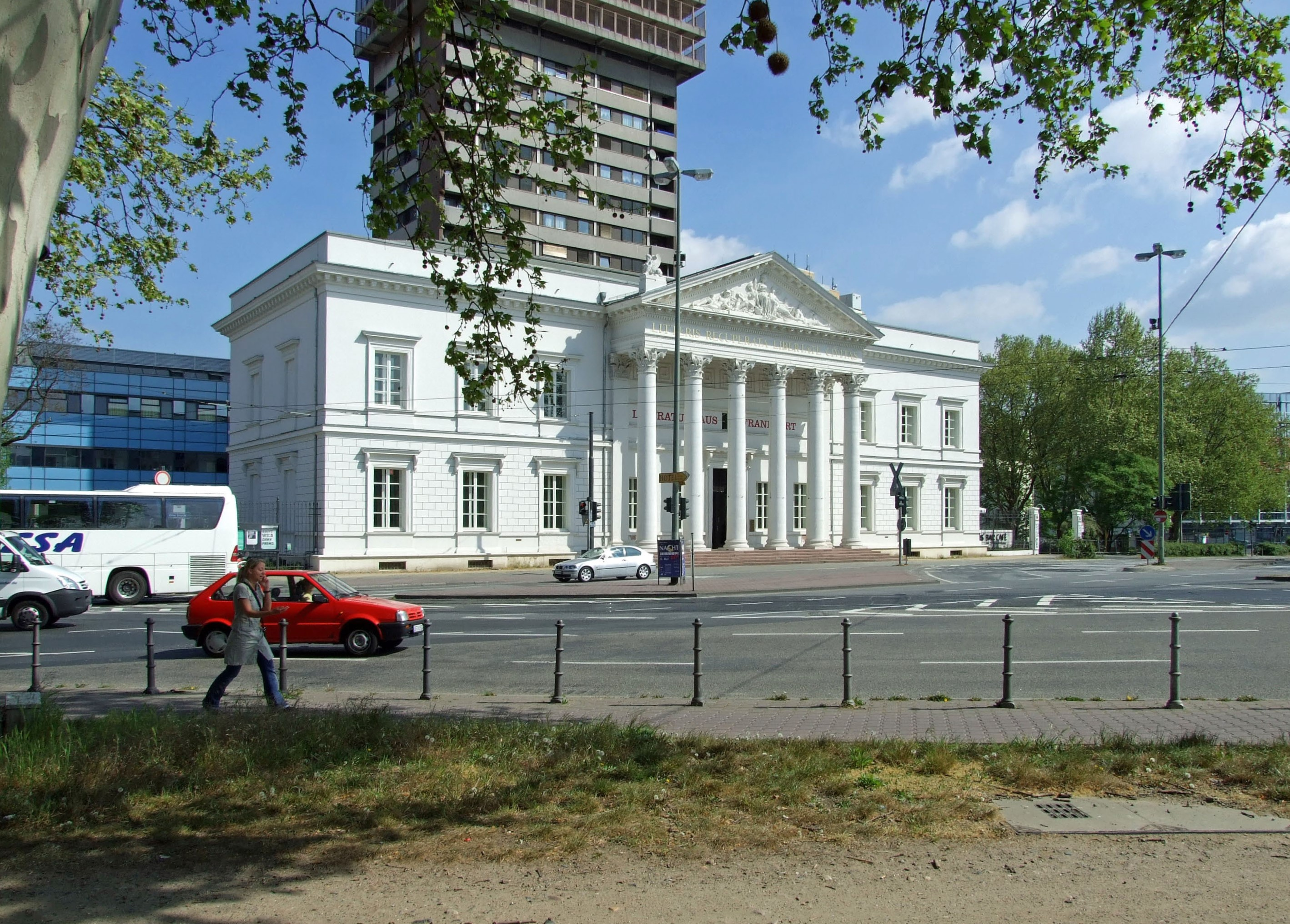 Portikus der Alten Stadtbibliothek, das heutige Literaturhaus in Ffm an der Flößerbrücke, freies Theater